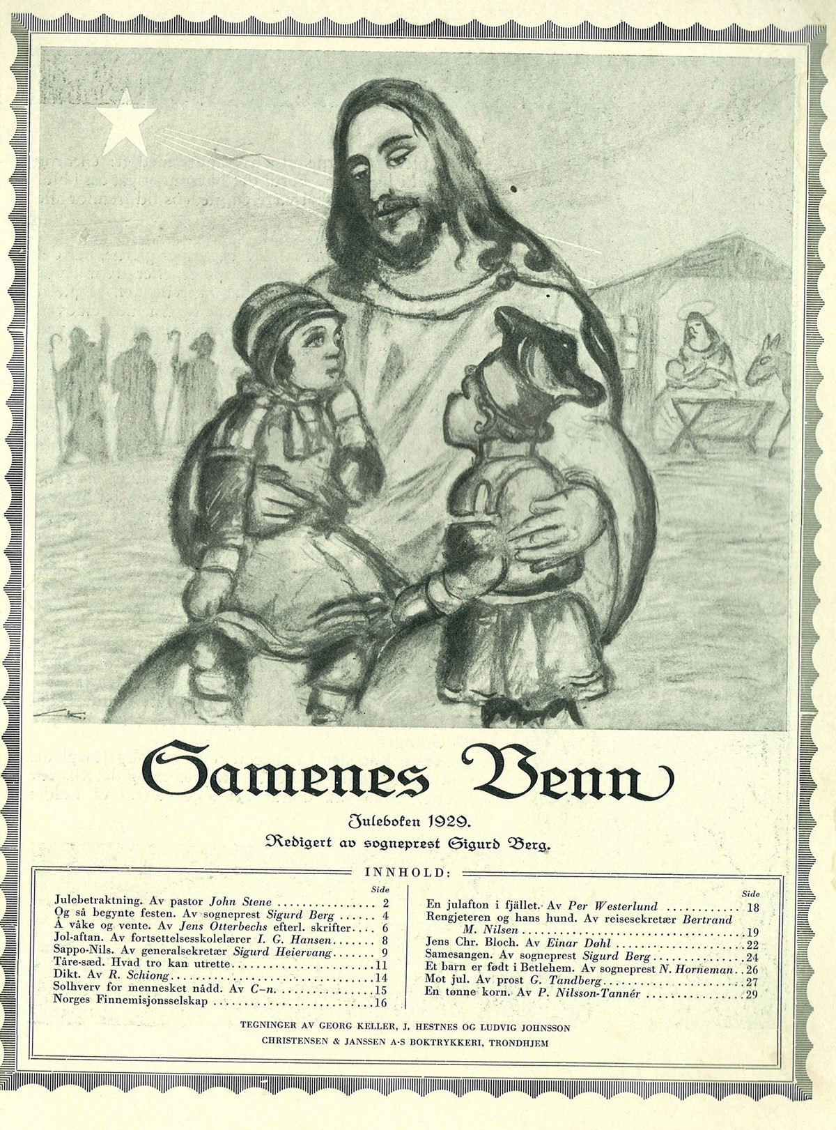 Samenes venn1929, Skanna frå heftet